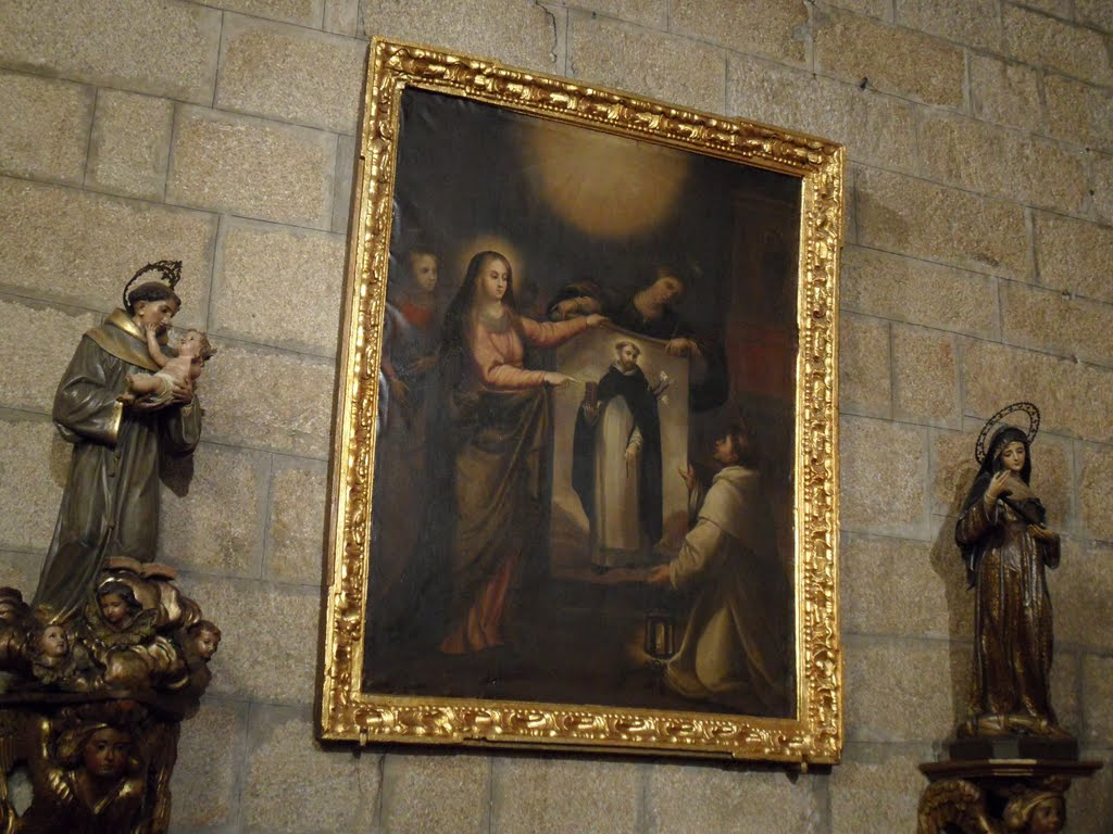 En el crucero izquierdo se encuentra un gran lienzo representando la Aparición de Santo Domingo en Soriano Cálabro (Italia). El lienzo, anónimo, refleja un acontecimiento o leyenda según la cual el 15 de septiembre de 1530 la Virgen se apareció a Fray Lorenzo da Grotteria y le entregó una tela con la representación de Santo Domingo. A ambos lados están las imagenes de San Antonio de Padua y Santa Rita de Casia.